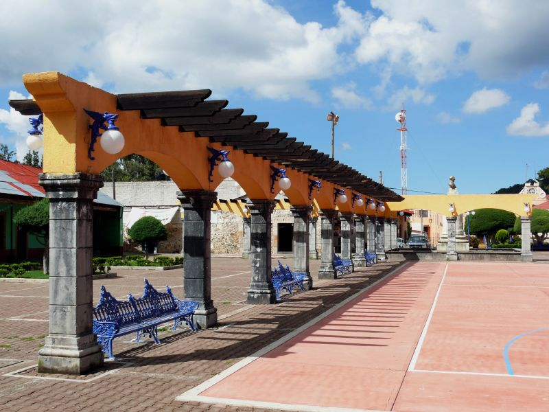 Yendo de Pachuca hacia Huasca de Ocampo, encontrarán Omitlán, un poblado pintoresco.